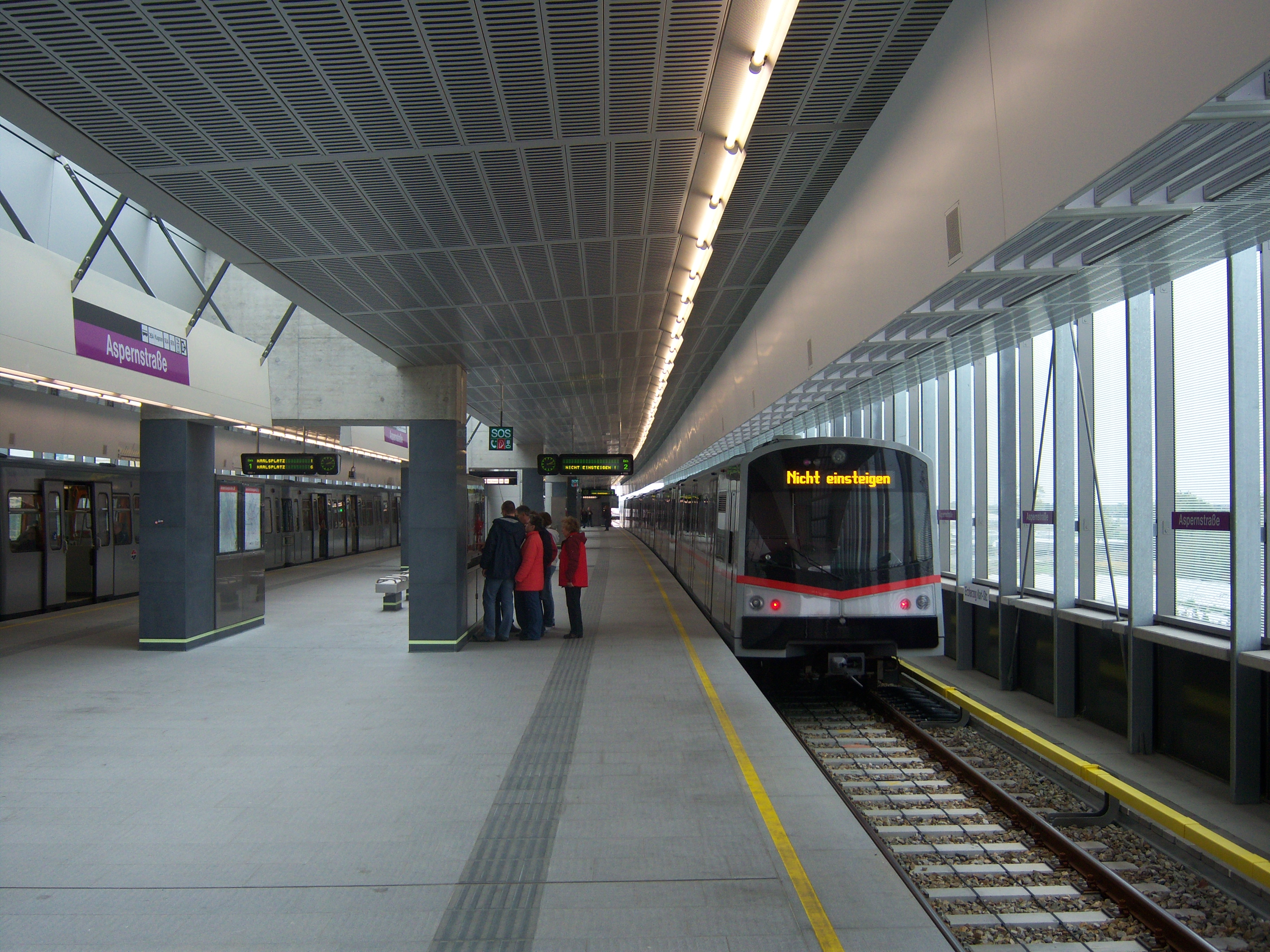 U2-Station Aspernstraße